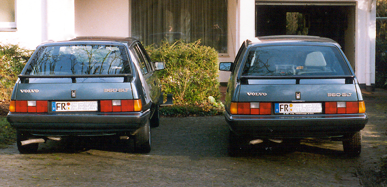 Volvo 360 GLT, left 1987, right 1988.